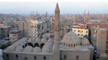 Caminin genel görünümü